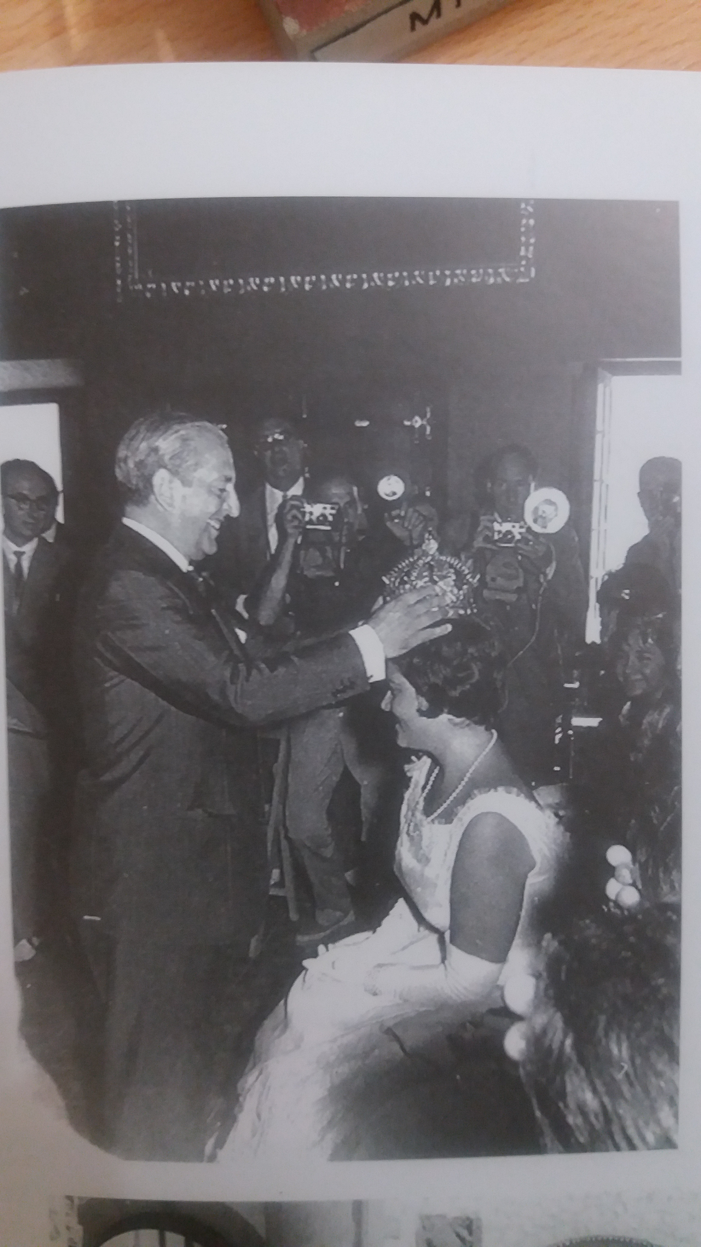 Mari Lys de Rueda, primera Reina de la Verema, coronada per Joaquin Calvo Sotelo